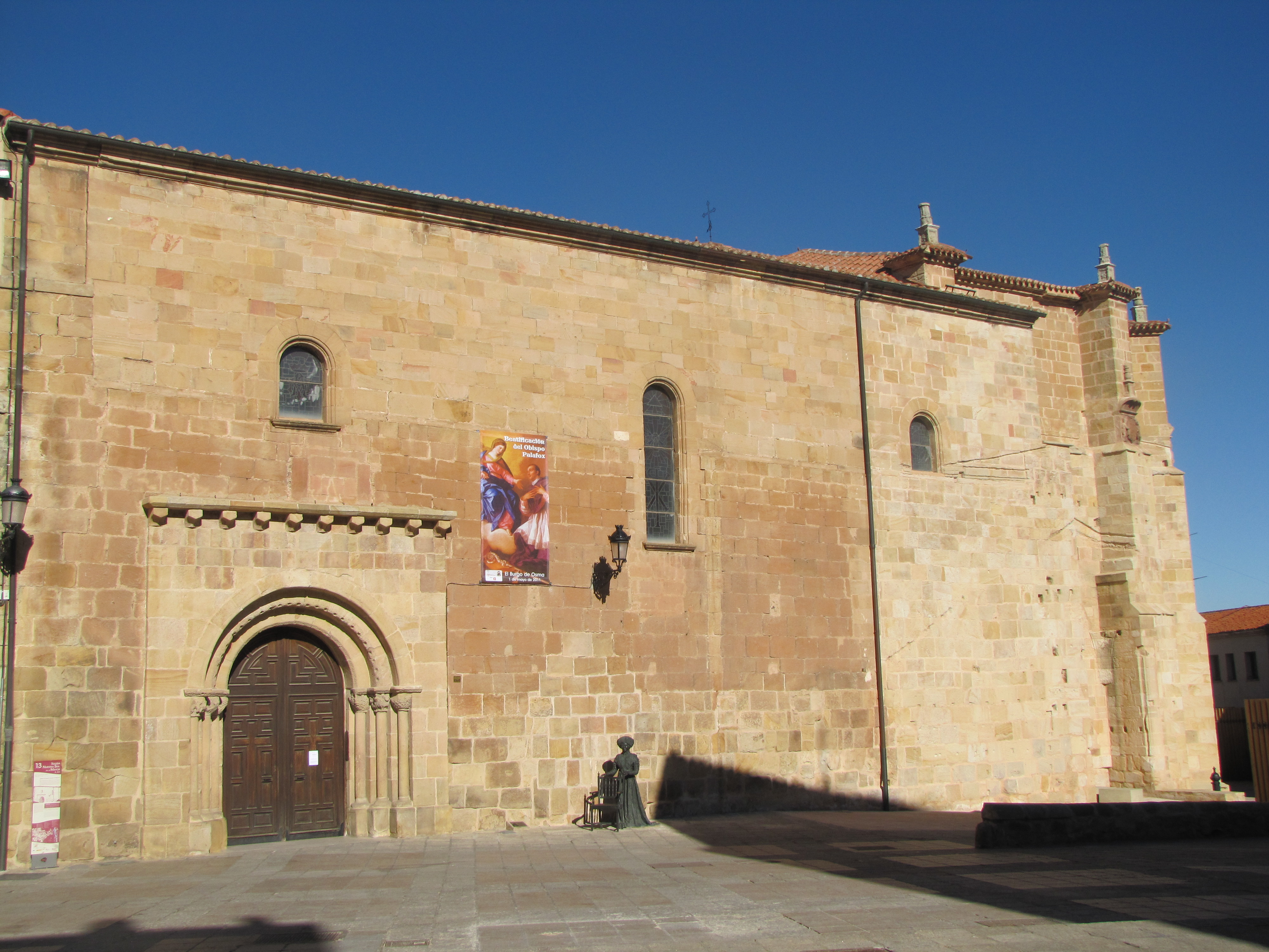 Iglesia de La Mayor en Soria.